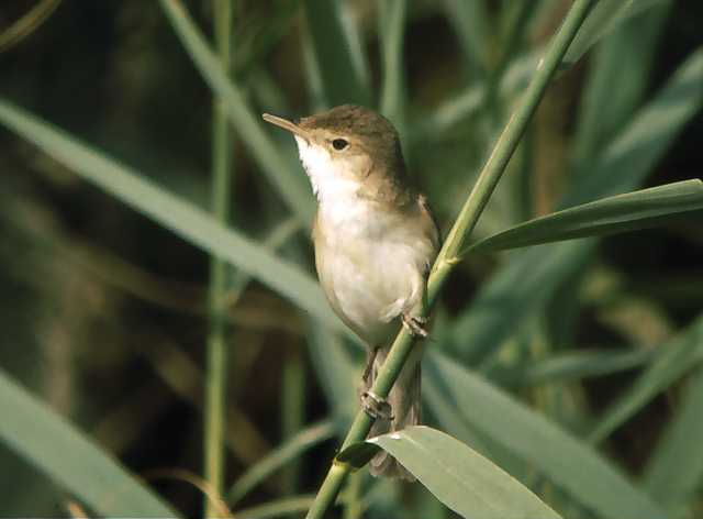 Acrocephalus scirpaceus